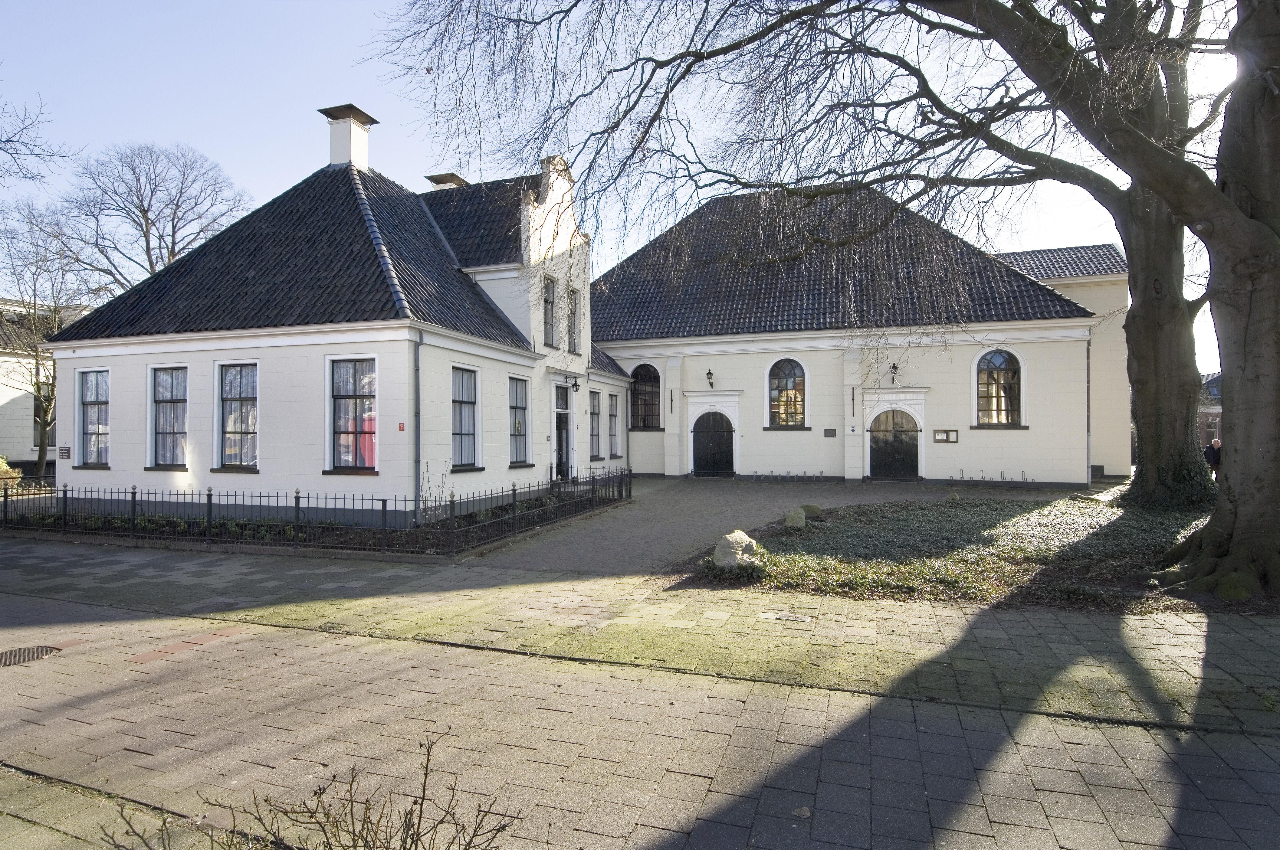 Hervormde Kerk: Overzicht kerk (rechts) en pastorie (links)